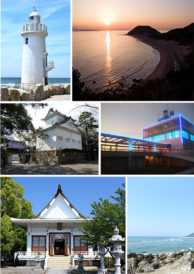 Tahara montage